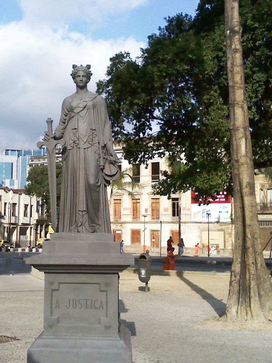 Fundição Val D'Osne: estátua em ferro fundido "A Justiça", praça Tiradentes, centro histórico do Rio de Janeiro, estado do Rio de Janeiro, Brasil.